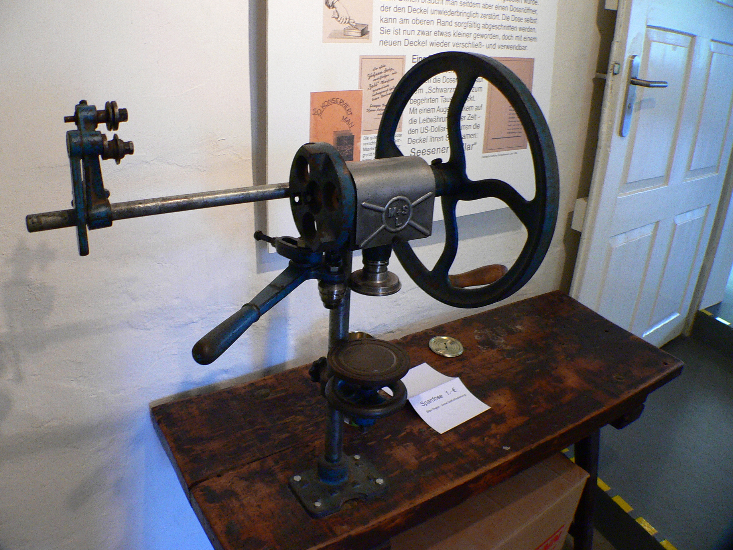 Konserverdosen-Verschließmaschiene für den Hausgebrauch . Ausstellungsstück im Heimatmuseum Seesen, der "Konserven-Stadt Deutschlands".